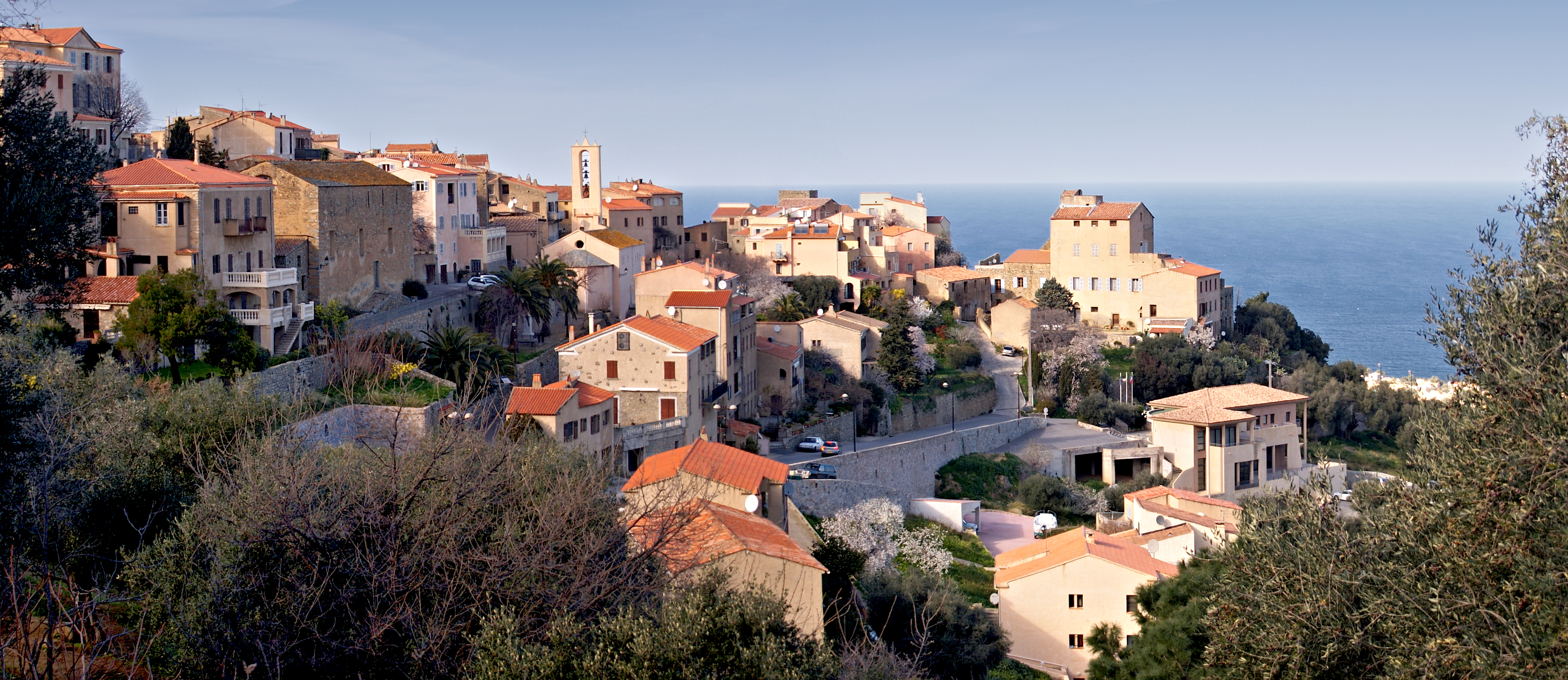 Monticello (Corsica) - Panorama sur le village